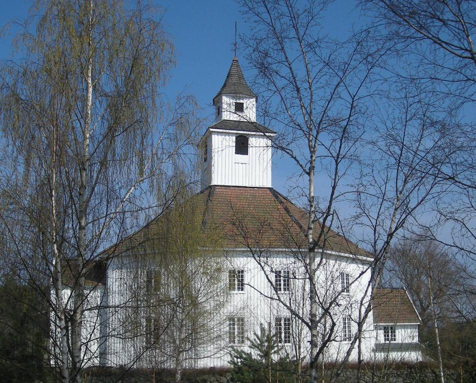 Hornnes kirke, Setesdalen